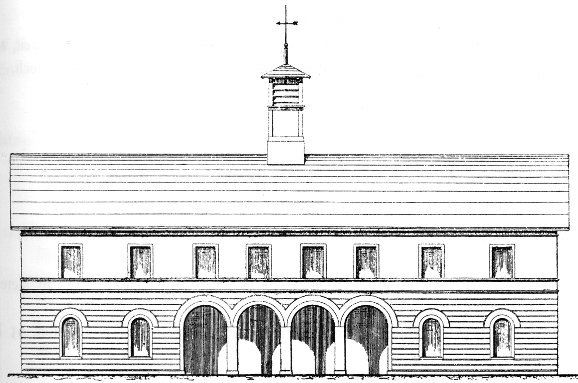 Bahnhof Bietigheim (Württemberg), 1. Bahnhof von 1847.